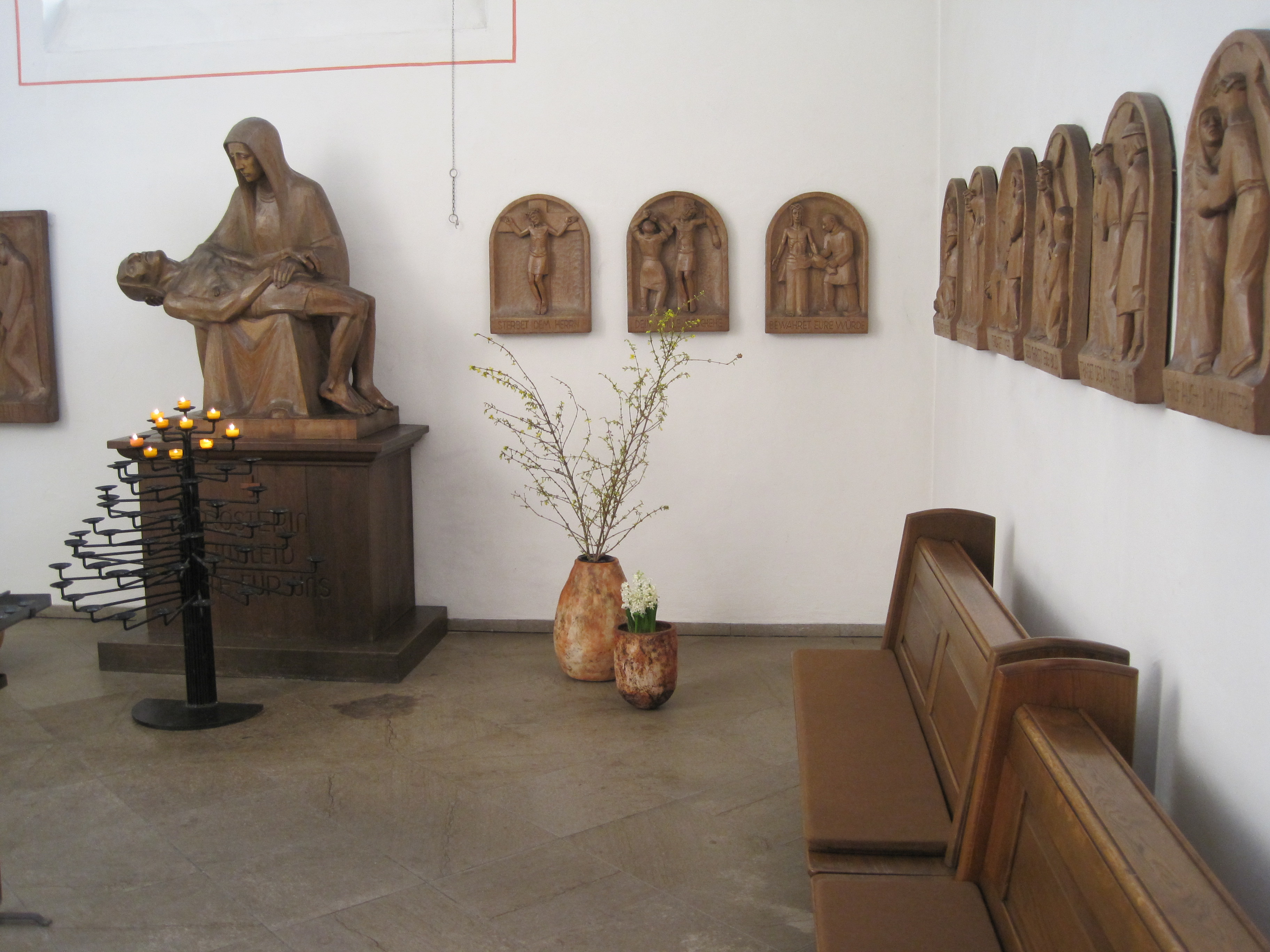 Das Foto zeigt die Seitenkapelle der St. Agnes-Kirche in Hamm.